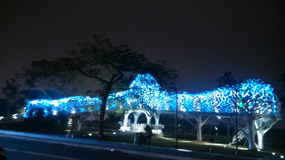 嘉義市蘭潭の月影潭心